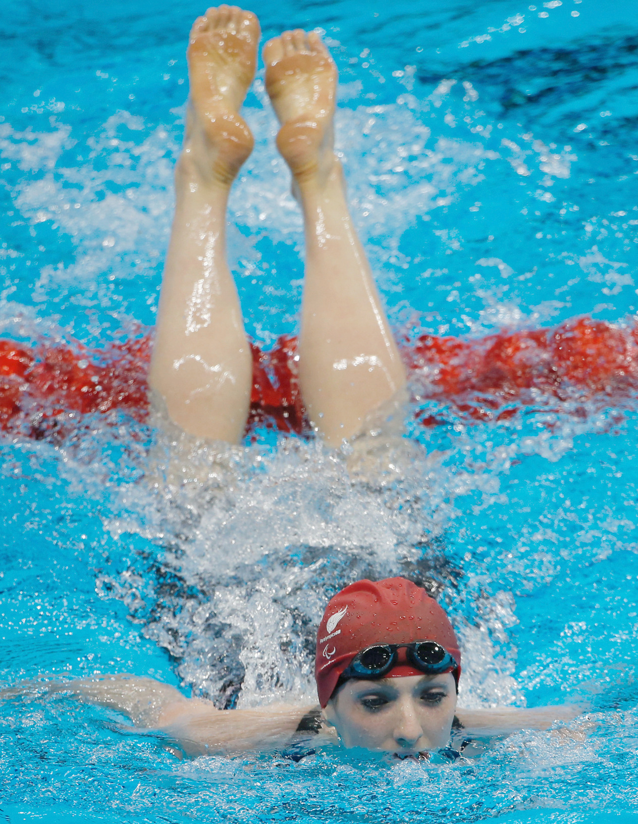 Rio de Janeiro - Bethany Firth, da Grã-Bretanha, leva medalha de ouro nos 200m nado livre S14 nos Jogos Paralmpicos Rio 2016, no Estdio Aqutico.